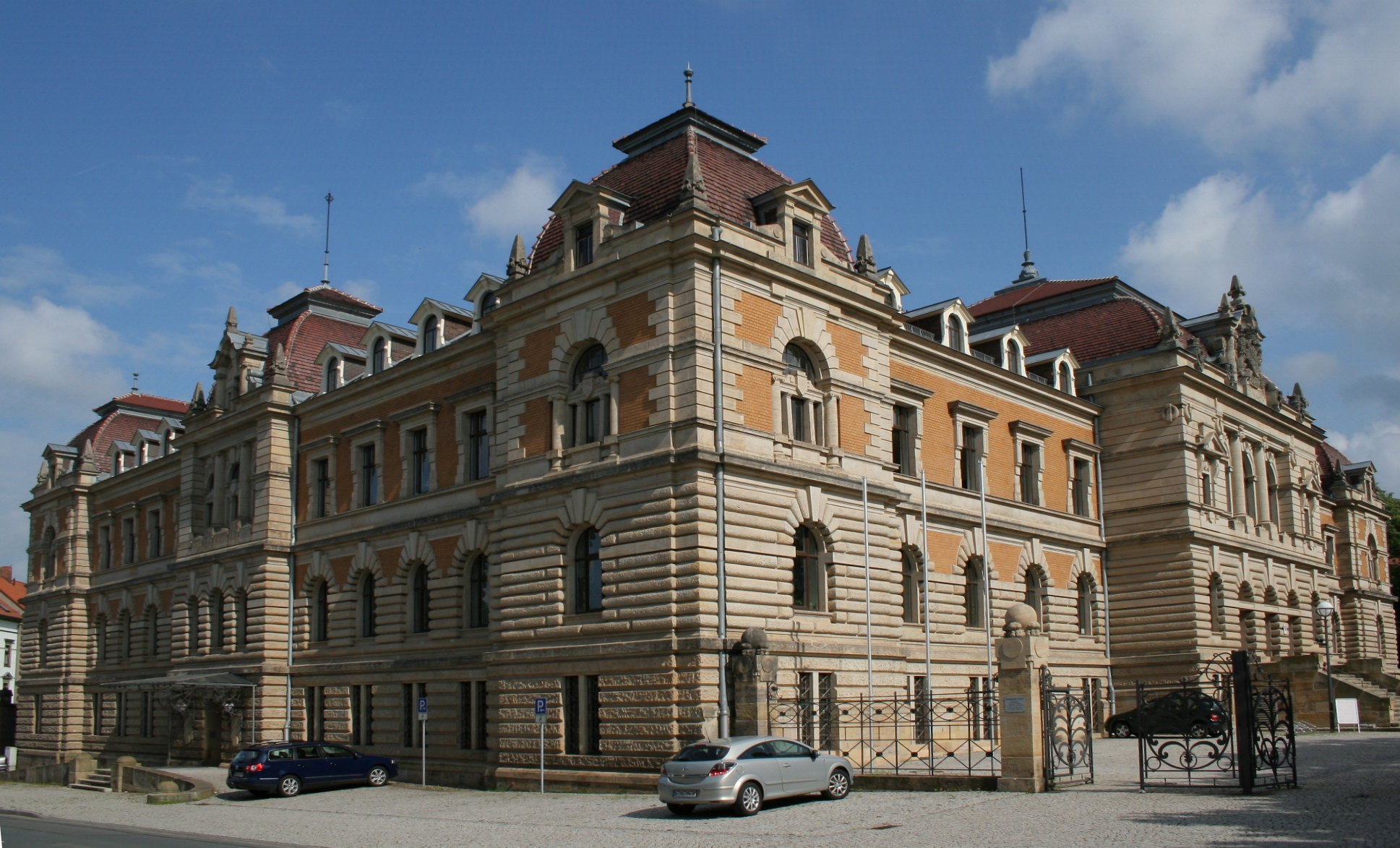 Gebäude des Amtsgerichts in Gotha.